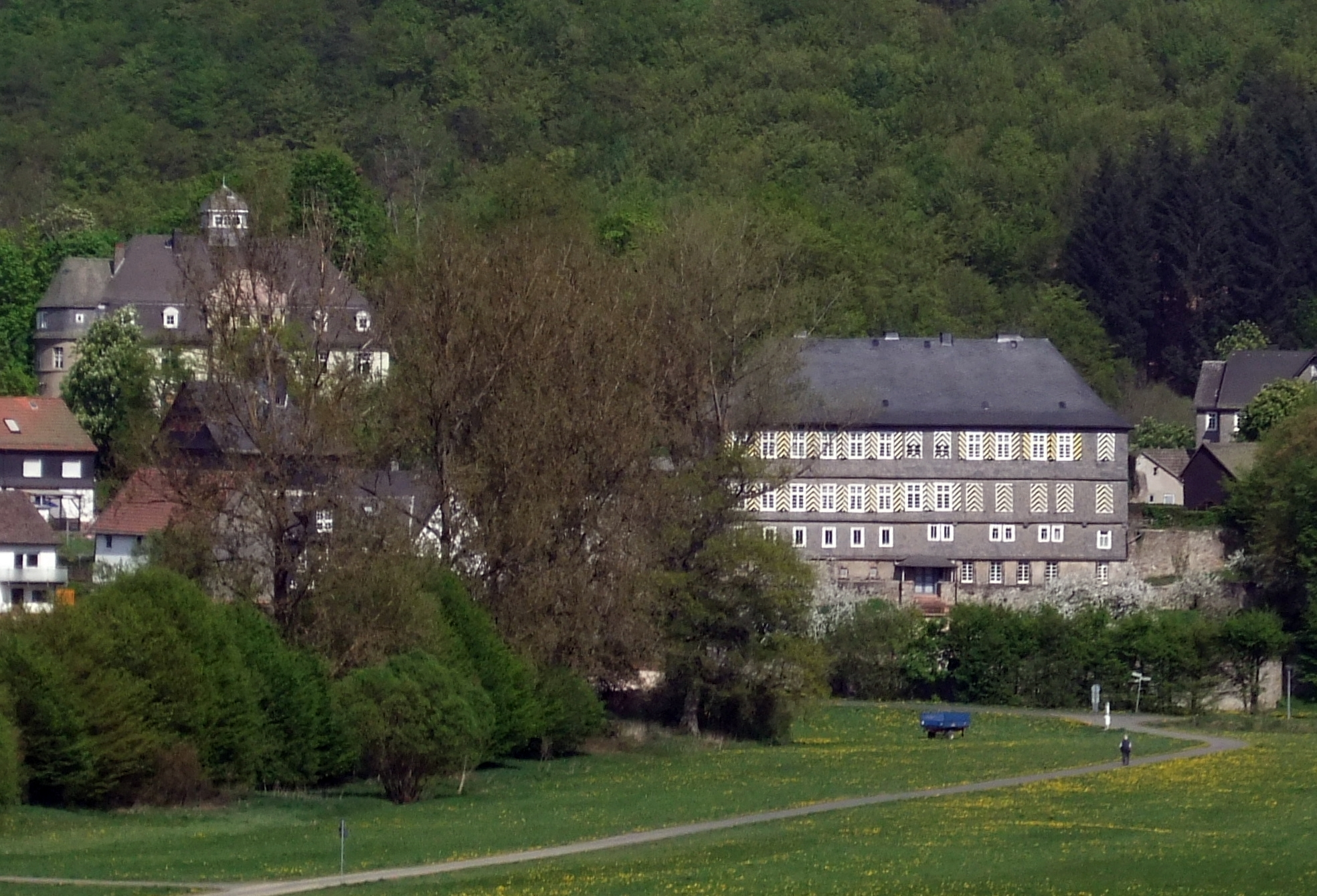 Schloss Breidenstein, links das neue, rechts das alte